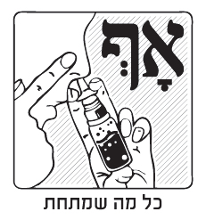 לוגו המגזין אף